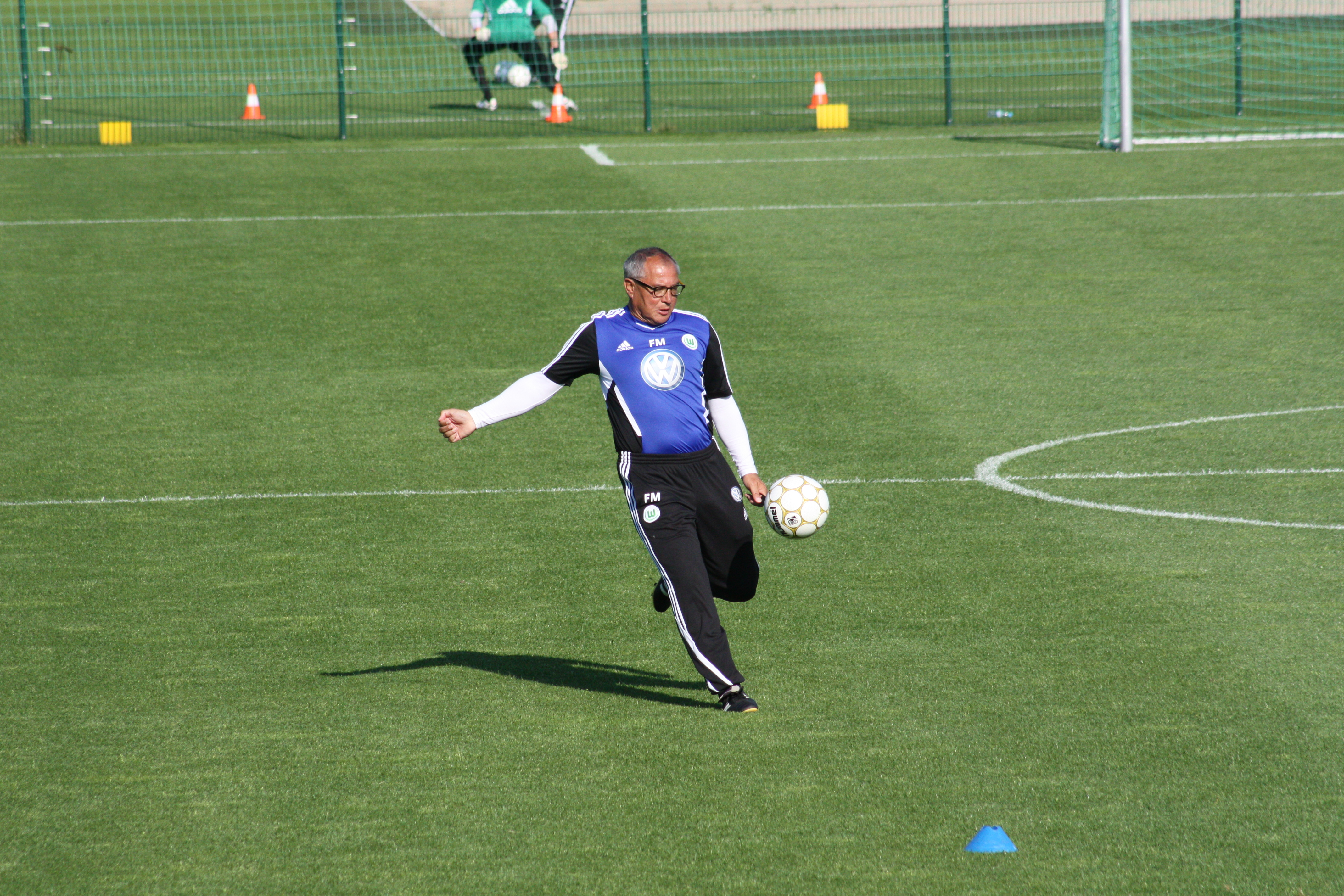 Felix Magath auf dem Trainingsplatz des VfL Wolfsburg